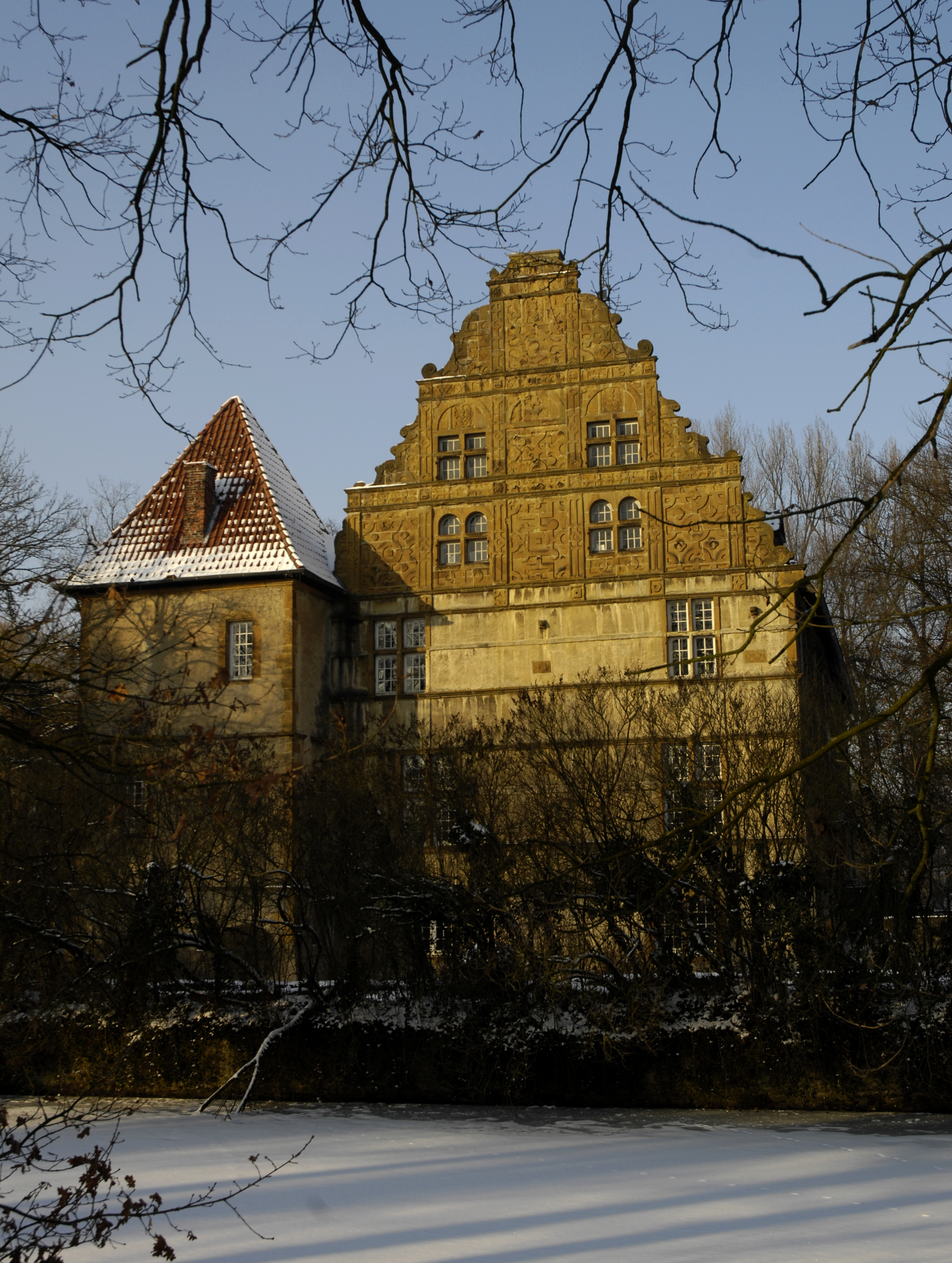 Borgholzhausen, Schloss Holtfeld